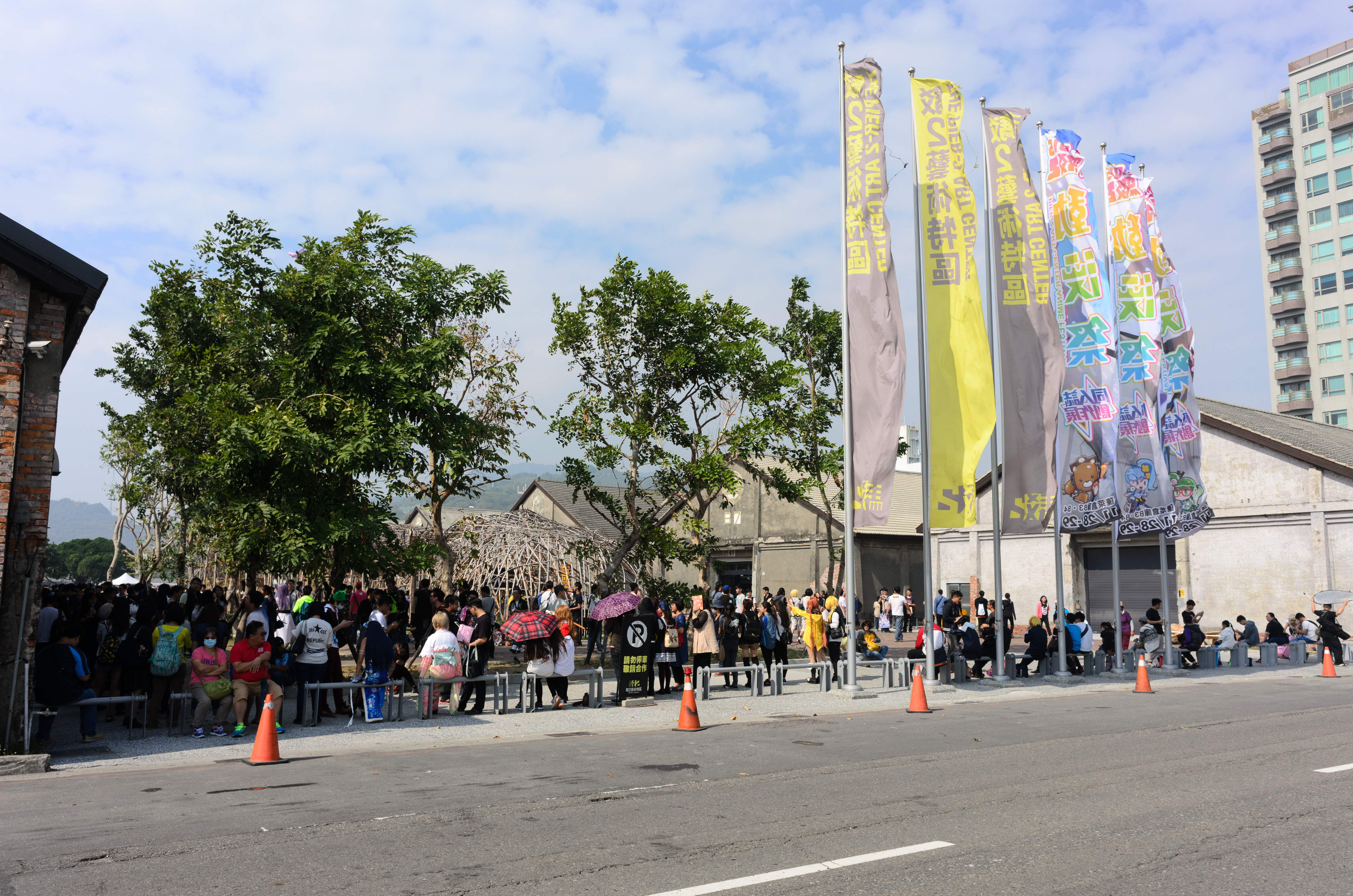 駁二藝術特區外，高雄市鼓山區蓬萊路旁飄揚的2015駁二動漫祭與駁二藝術特區巨型立幟。